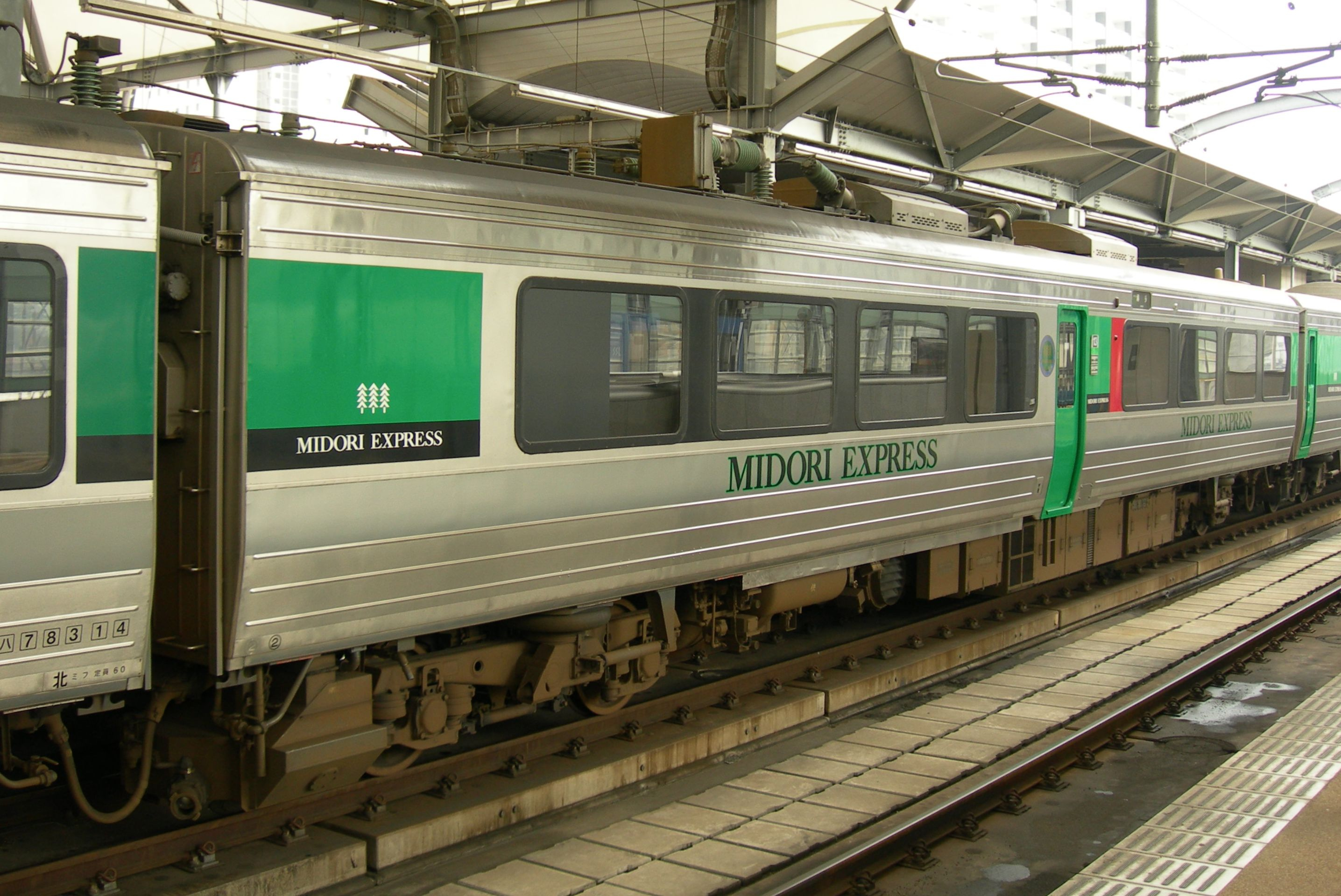 JR九州783系電車モハ783形100番台